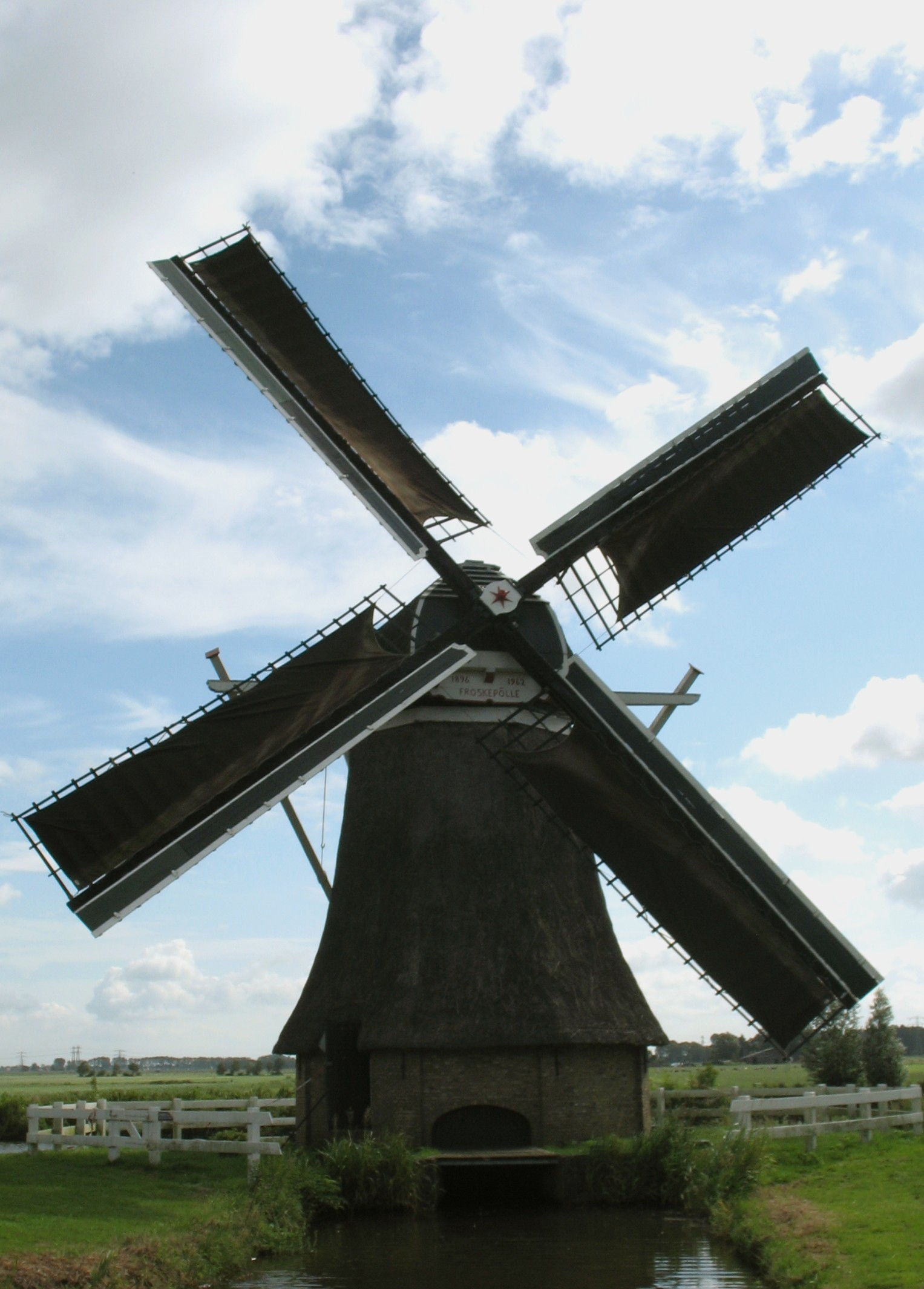 Poldermolen de "Froskepôle" te Leeuwarden